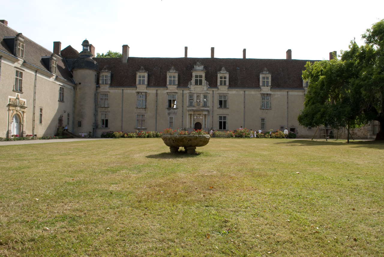 Le Château du Fraisse à Nouic, Haute-Vienne